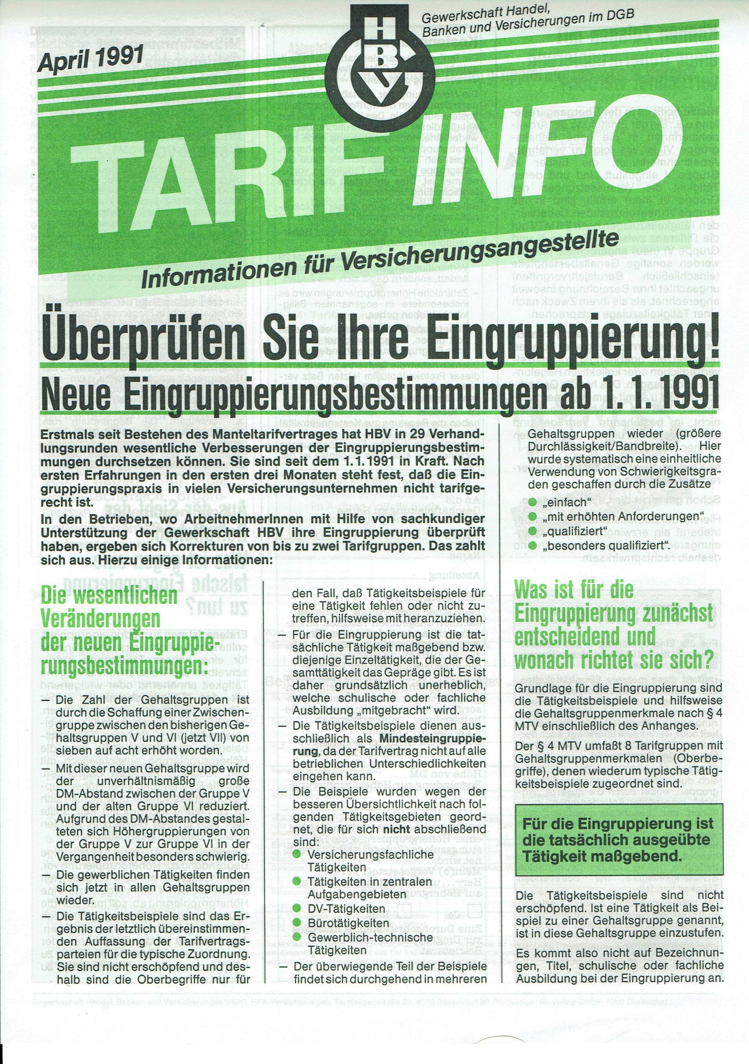 Tarif-Info der Gewerkschaft HBV April 1991